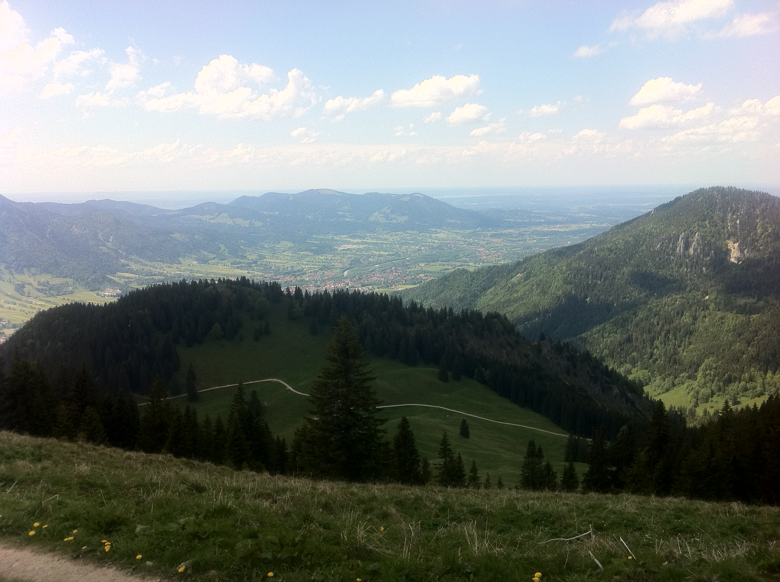 Blick vom Seekarkreuz nach Lenggries